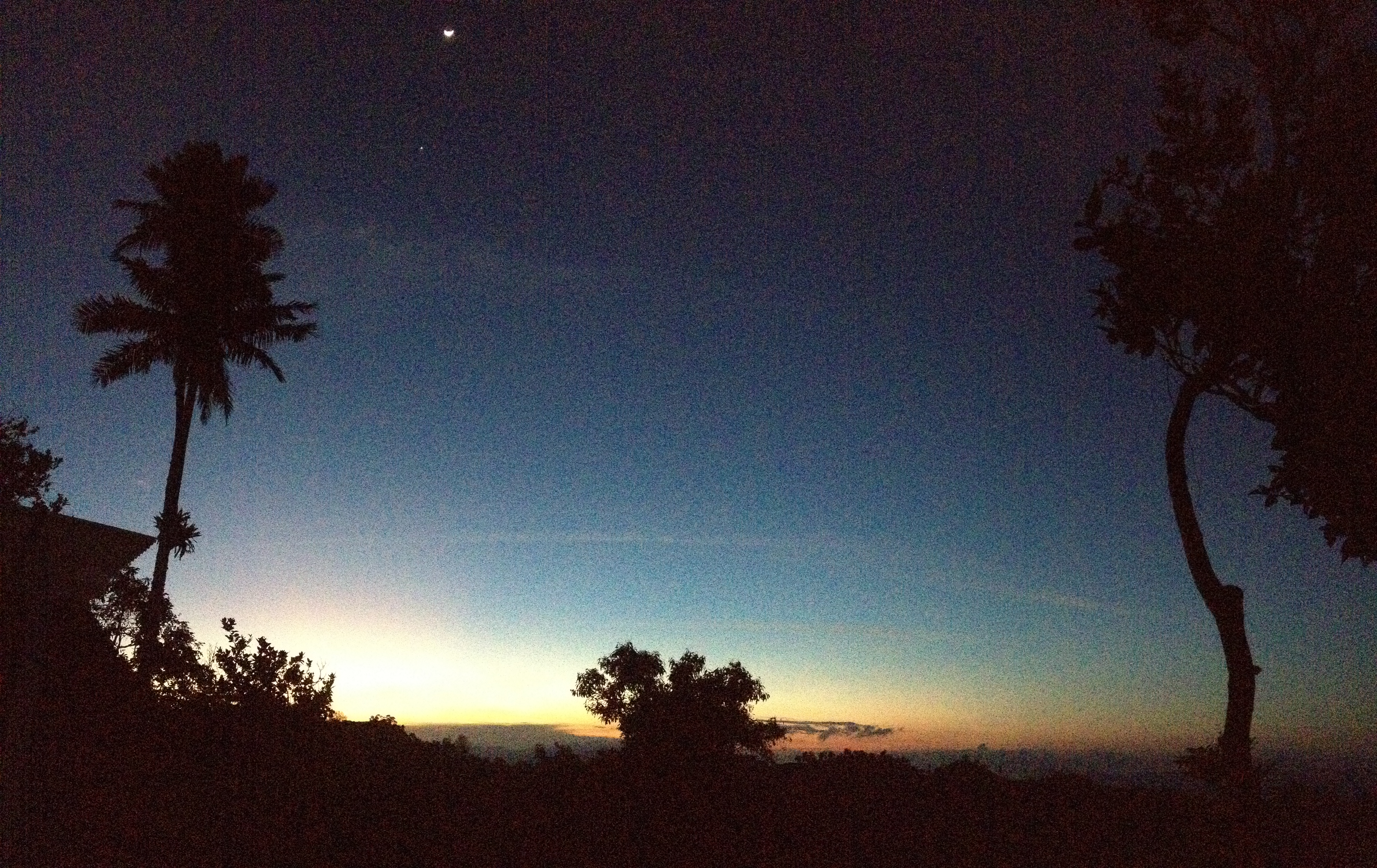 Tomada desde Casa Hotel La Ceiba en Vergara, Cundinamarca, Colombia Esta fotografía fue tomada en el municipio colombiano con código 25862.